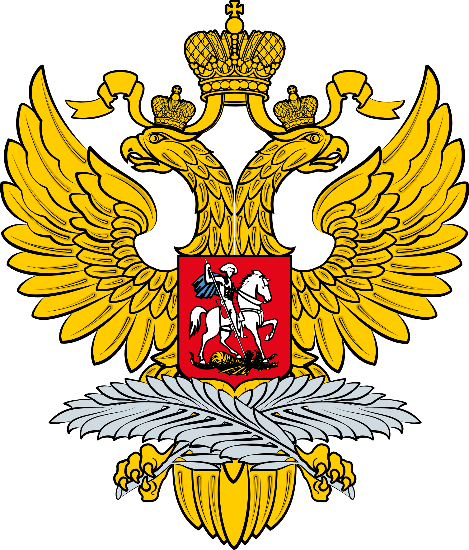 Эмблема МИД РФ